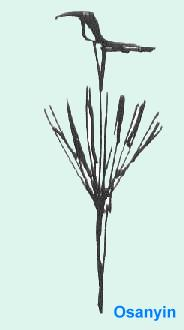 Ferramenta de Osanyin